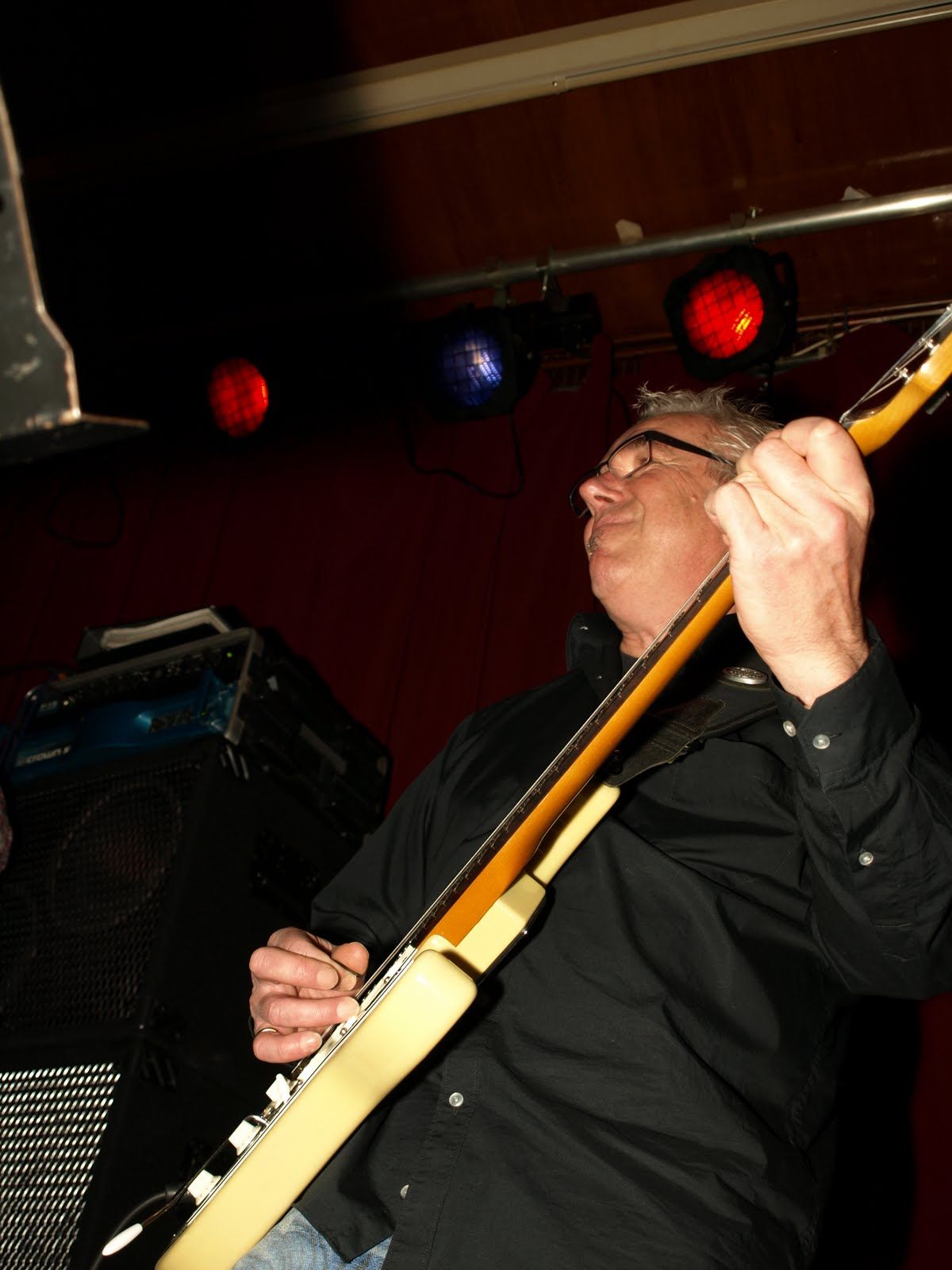 Leo van de Ketterij is een gitarist uit Vlissingenop deze foto als gastgitarist van GrandpaNicksessieband in 2011